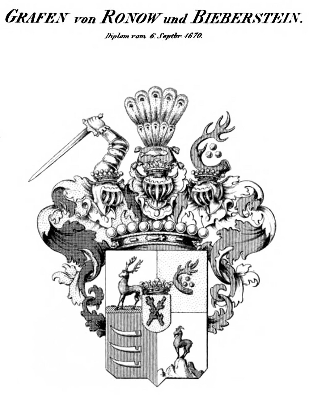 Wappen Ronow und Bieberstein - Tyroff HA.jpg